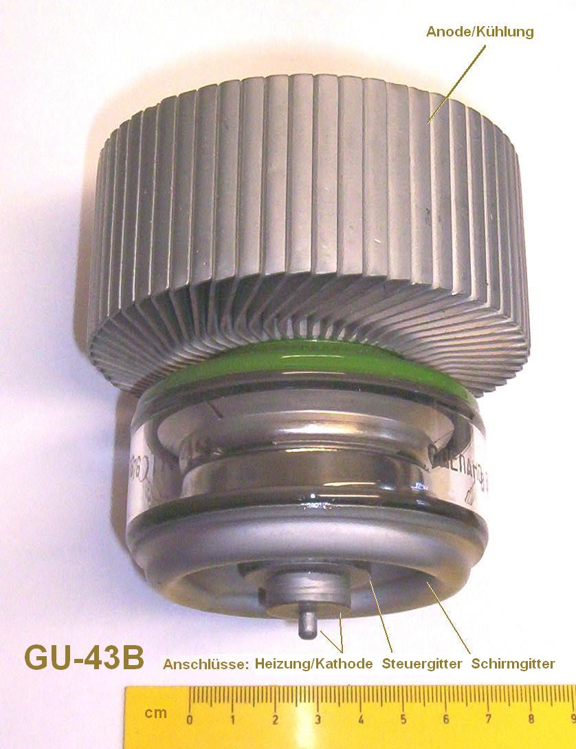 Scheibentetrode GU-43B (Sowjetunion 1976), 1500 Watt, bis 100MHz, forcierte Luftkühlung